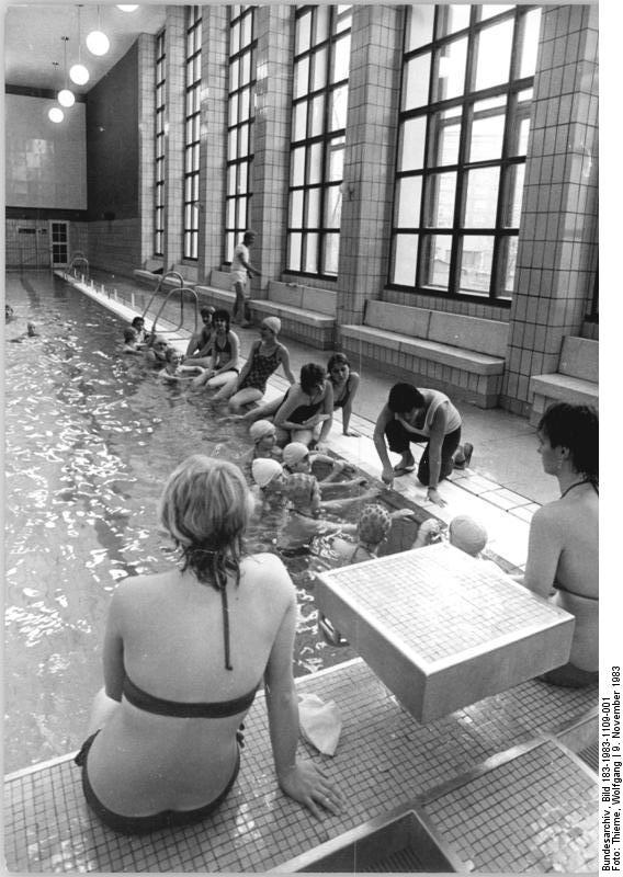 Chemnitz, Hallenbad ADN-ZB Thieme 9.11.83-zin-Karl-Marx-Stadt: Wieder Hochbetrieb im Stadtbad - Als attraktiver Sportkomplex im Zentrum von Karl-Marx-Stadt präsentert sich nach zweijährigen umfangreichen Rekonstruktionsarbeiten das Stadtbild der Bezirksstadt. Es ist ein gelungenes Ensemble einer Vielzahl schön gestalteter Sportstätten und medizinischer Abteilungen. Die rekonstruierte 25-Meter-Halle ist unter anderem den jüngeren BAdesästen vorbehalten. Schüler und Lehrlinge erhalten hier Schwimmunterricht - Dreiteilige Serie ! Siehe auch Motive 1983-1109-2 und 3 N